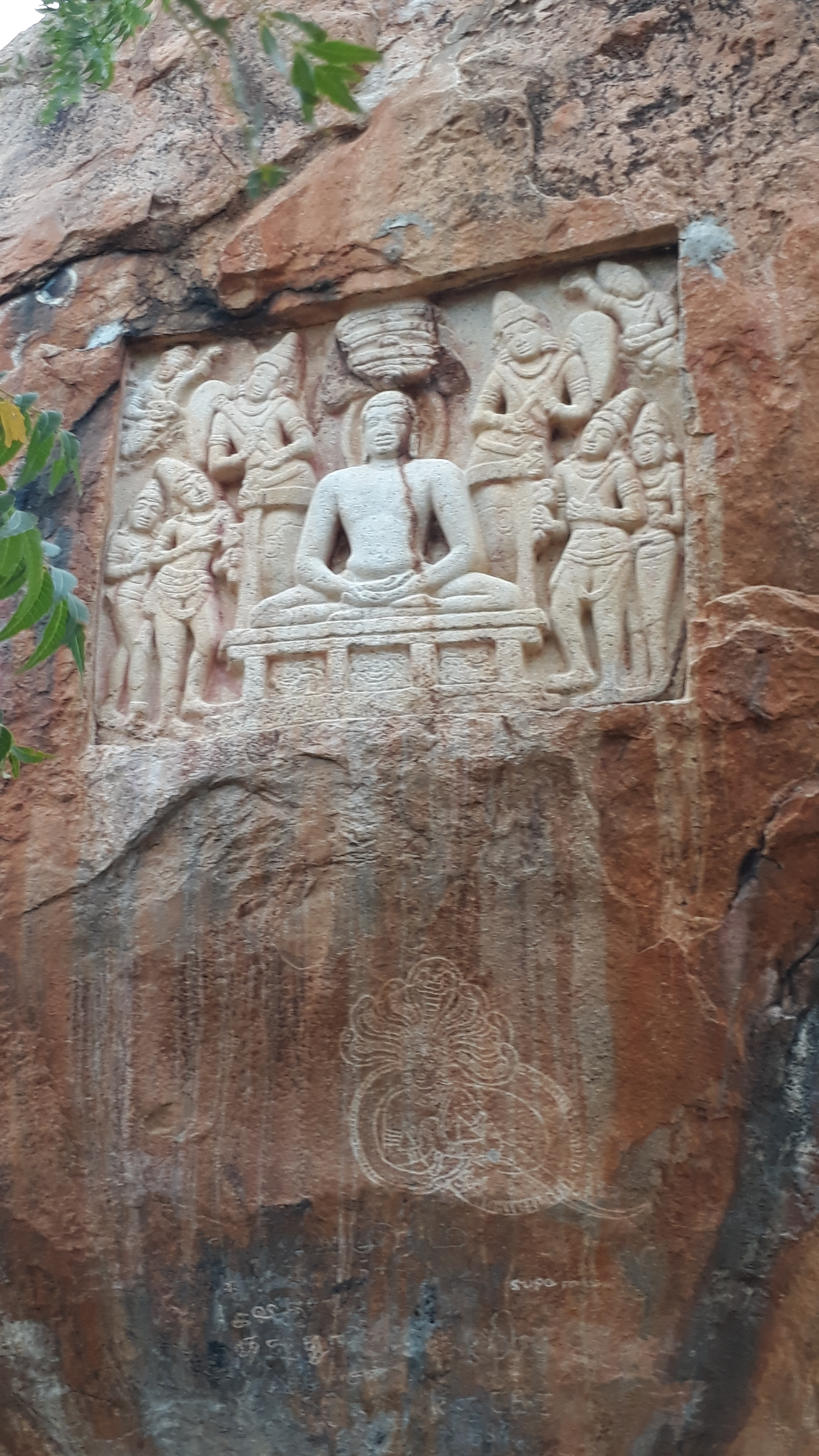 குண்டாங்கல் பாறையில் அமைந்த சமணச் சிற்பம்